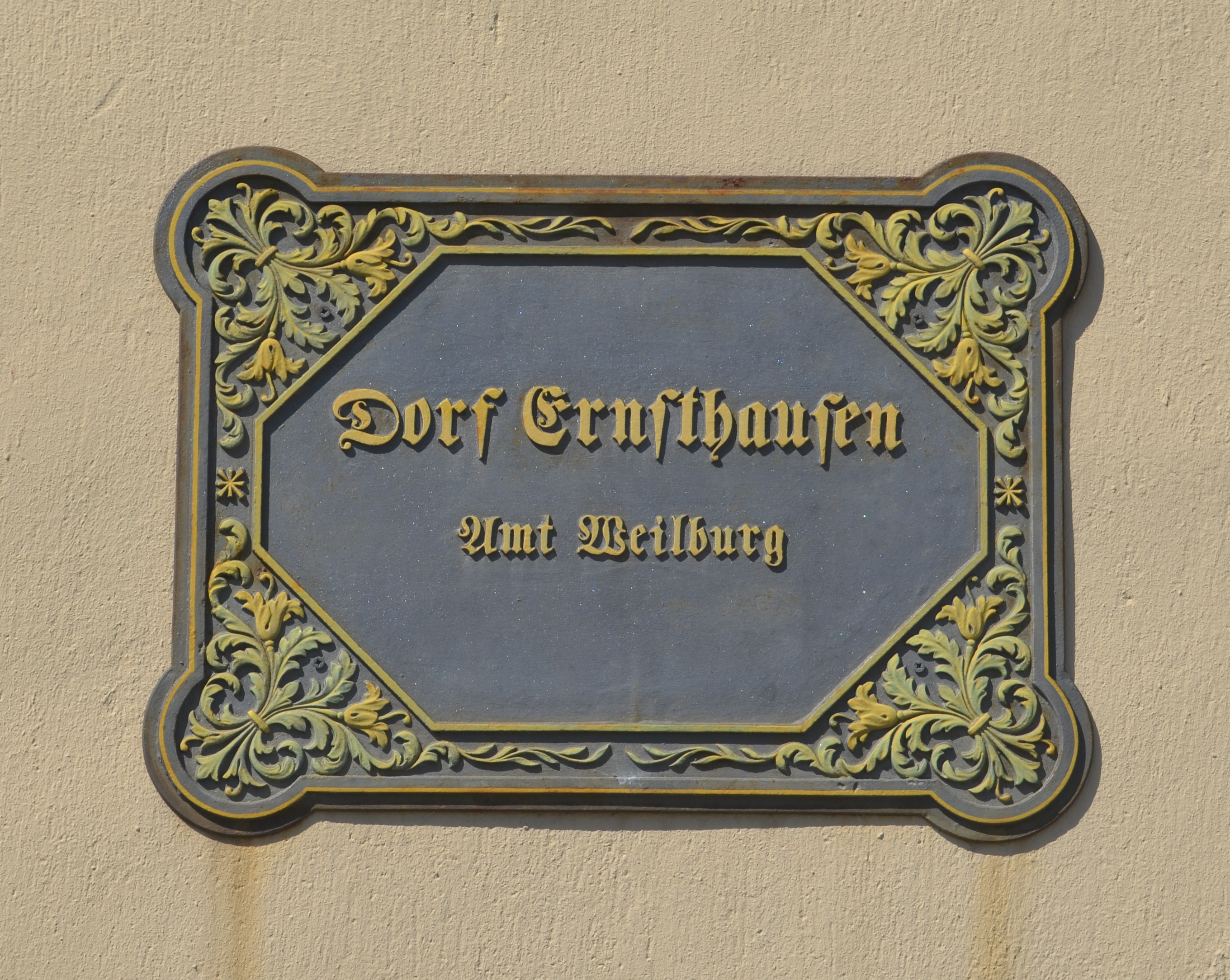 Ernsthausen, Bahnhofstraße 2, Tafel